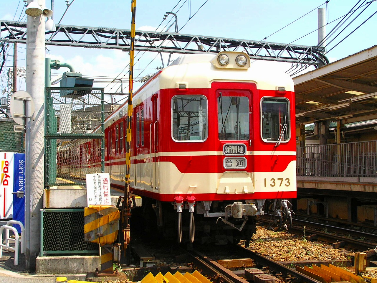 神戸電鉄三木駅付近（大村駅～三木駅）